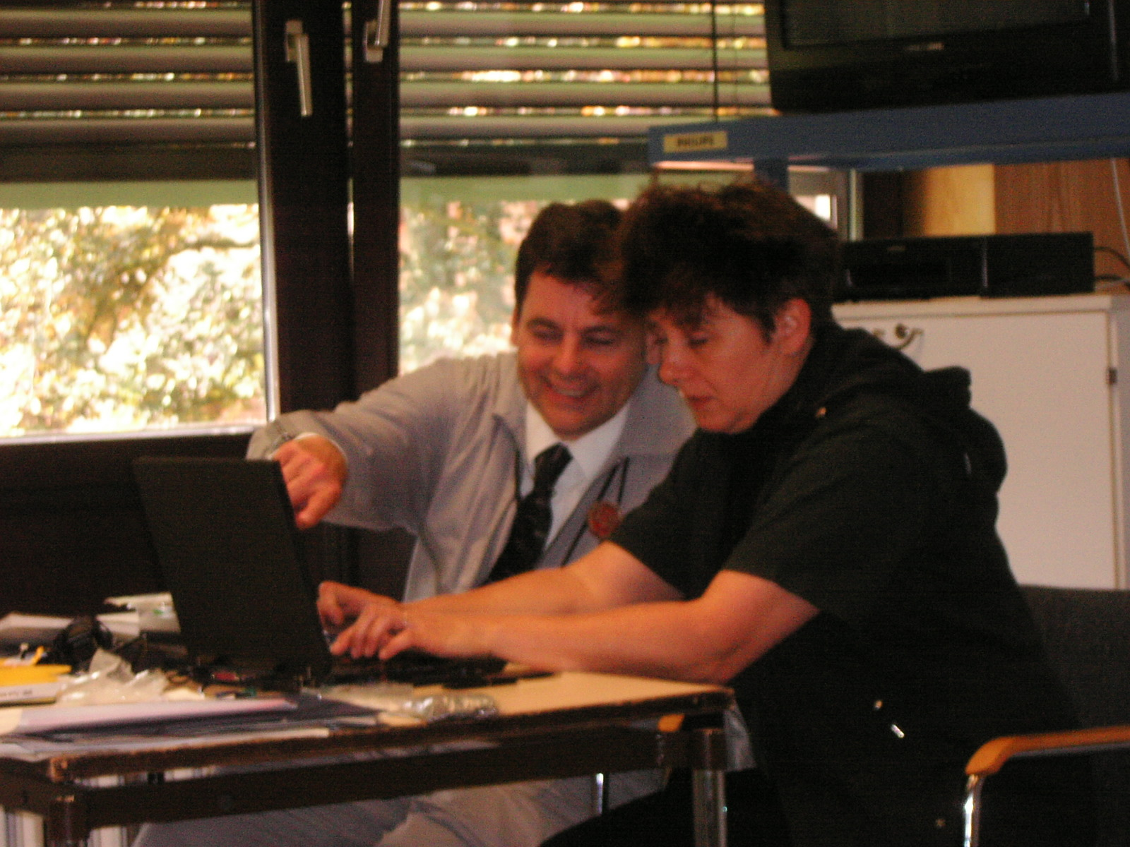 padeluun und Rena Tangens beim Mediensommer 2007 im Tagungszentrum Hattingen, DGB-Bildungswerk, Am Homberg 46-50 in Hattingen